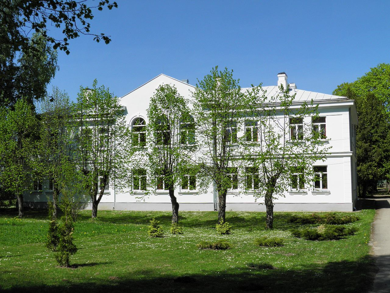 Bērzgala skola (1)